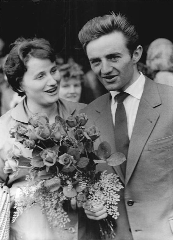 Bernhard Eckstein Zentralbild Kohls Kr-Hr 18.5.1961 Berlin: DDR-Friedensfahrer wieder zu Hause. Mit einer IL-14 der Deutschen Lufthansa ist die Friedensfahrtmannschaft der DDR am Nachmittag des 18.5.1961 aus Prag kommend nach Berlin zurückgekehrt. Zahlreiche Sportenthusiasten, das Flugzeugpersonal und die Betreuer bereiteten der Mannschaft auf dem Flughafen Schönefeld einen herzlichen Empfang. (Näheres siehe ADN-Meldung 115-609 vom 18.5.1961) UBz: Sie ist stolz auf ihren "Ecke" und er glücklich wieder bei ihr zu sein: Bernhard Eckstein mit seiner Frau auf dem Flughafen Schönefeld.